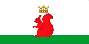 Беларуская (тарашкевіца): Сьцяг Бераставіцы Вялікае